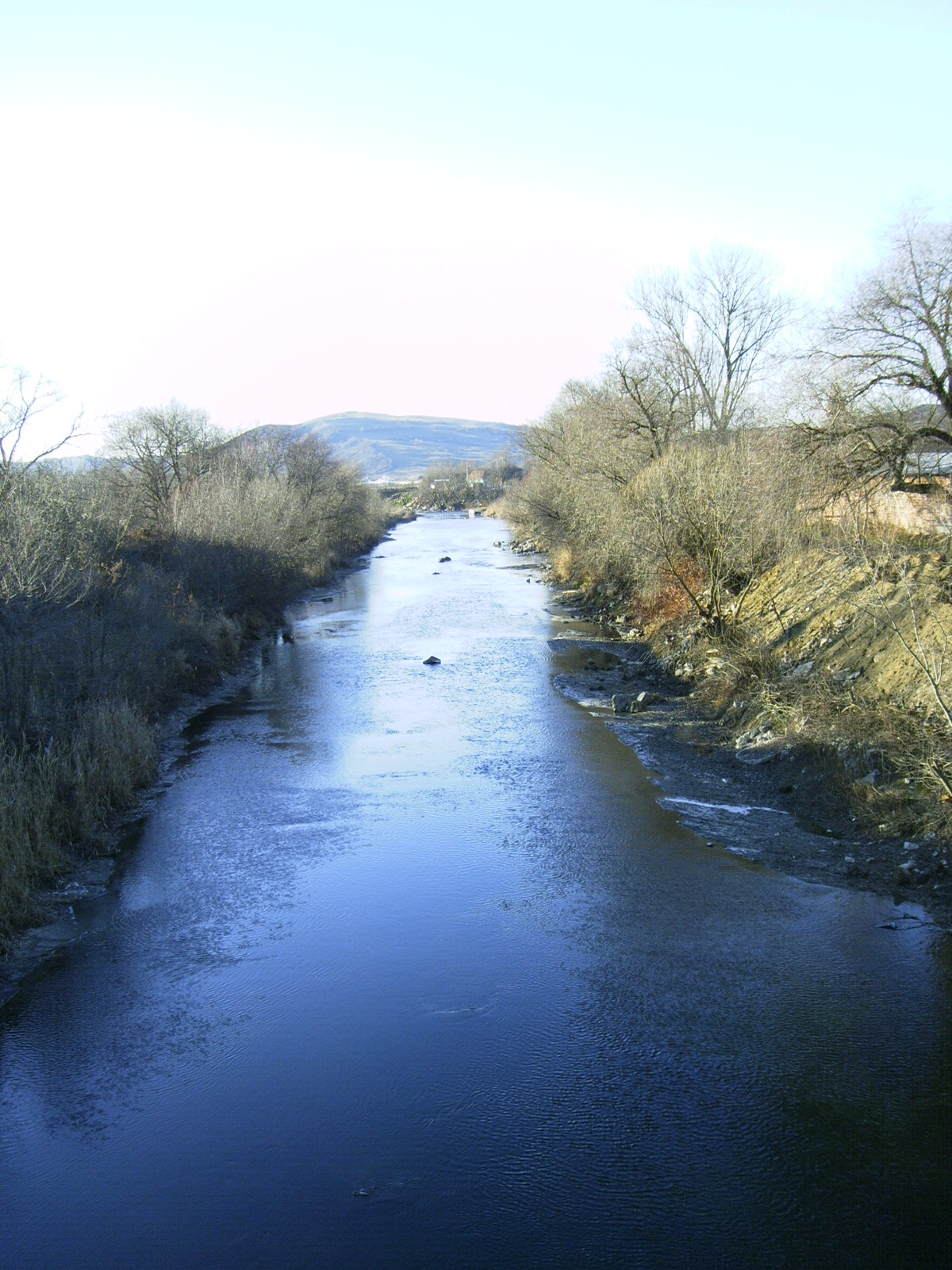 Die Große Kokel bei Cristuru Secuiesc (Keresztur, Siebenbürgen) .